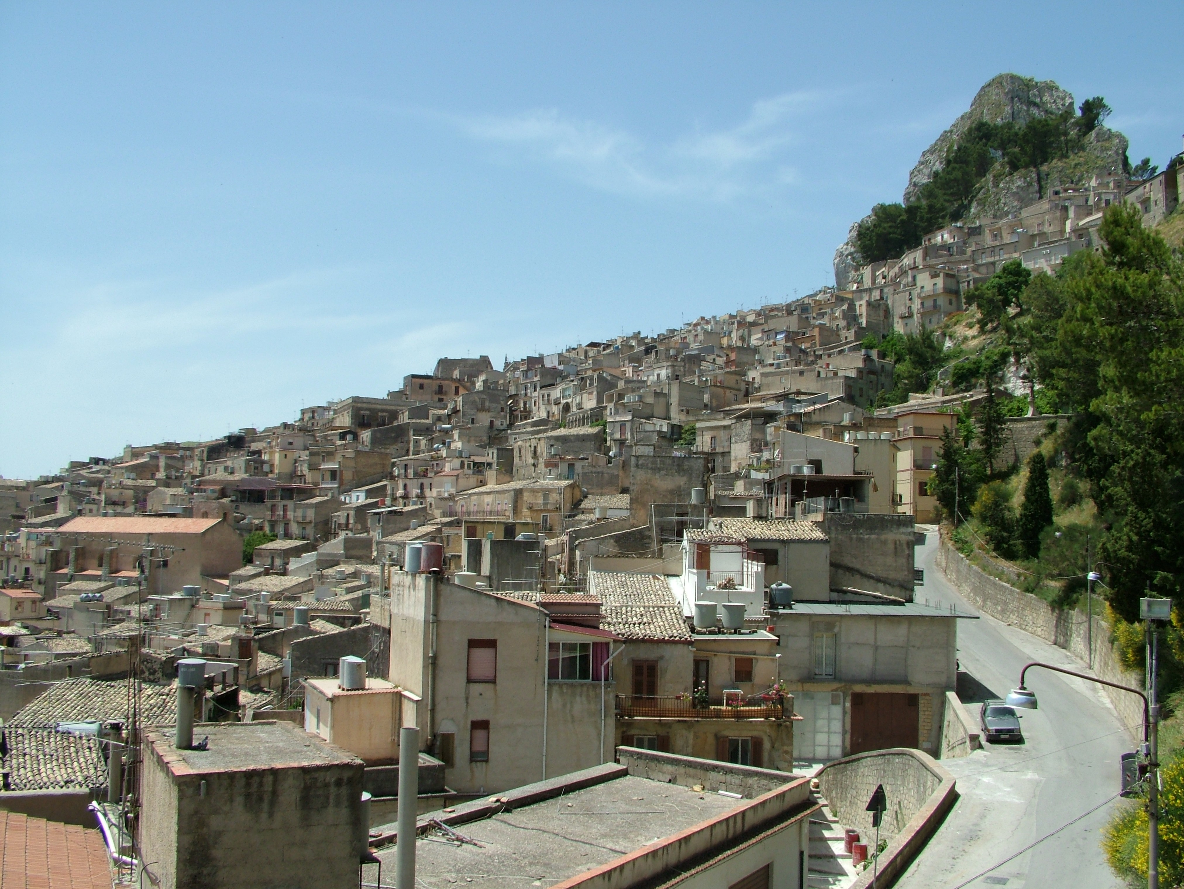 Caltabellotta, Sizilien, das Stadtbild von der Kirch S. Augustino aus